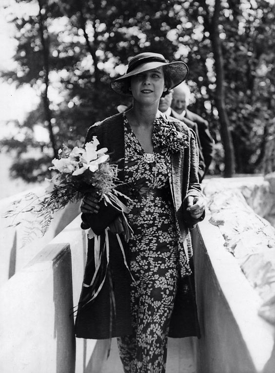 La Princesa de Piamonte, María José de Bélgica en los '30.